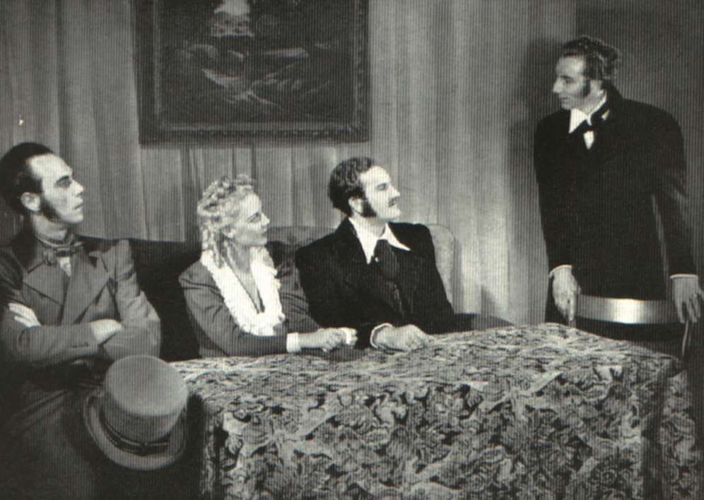 Szene aus dem bergmännischen Kurzspiel (Einakter) „Vor Hundert Jahren“, aufgeführt zur Feier des hundertjährigen Bestehens der Gewerkschaft Ver. Constantin der Große im Jahr 1949; Das Bild zeigt von links nach rechts: Hüttendirektor Dinnendahl (Götz Olaf Rausch), Frau Hagedorn (Irene Dodel (1922–2010)), Schreinermeister Hagedorn (Jürgen von Manger), Rechtsanwalt Weddige (Sylvester Schmidt)